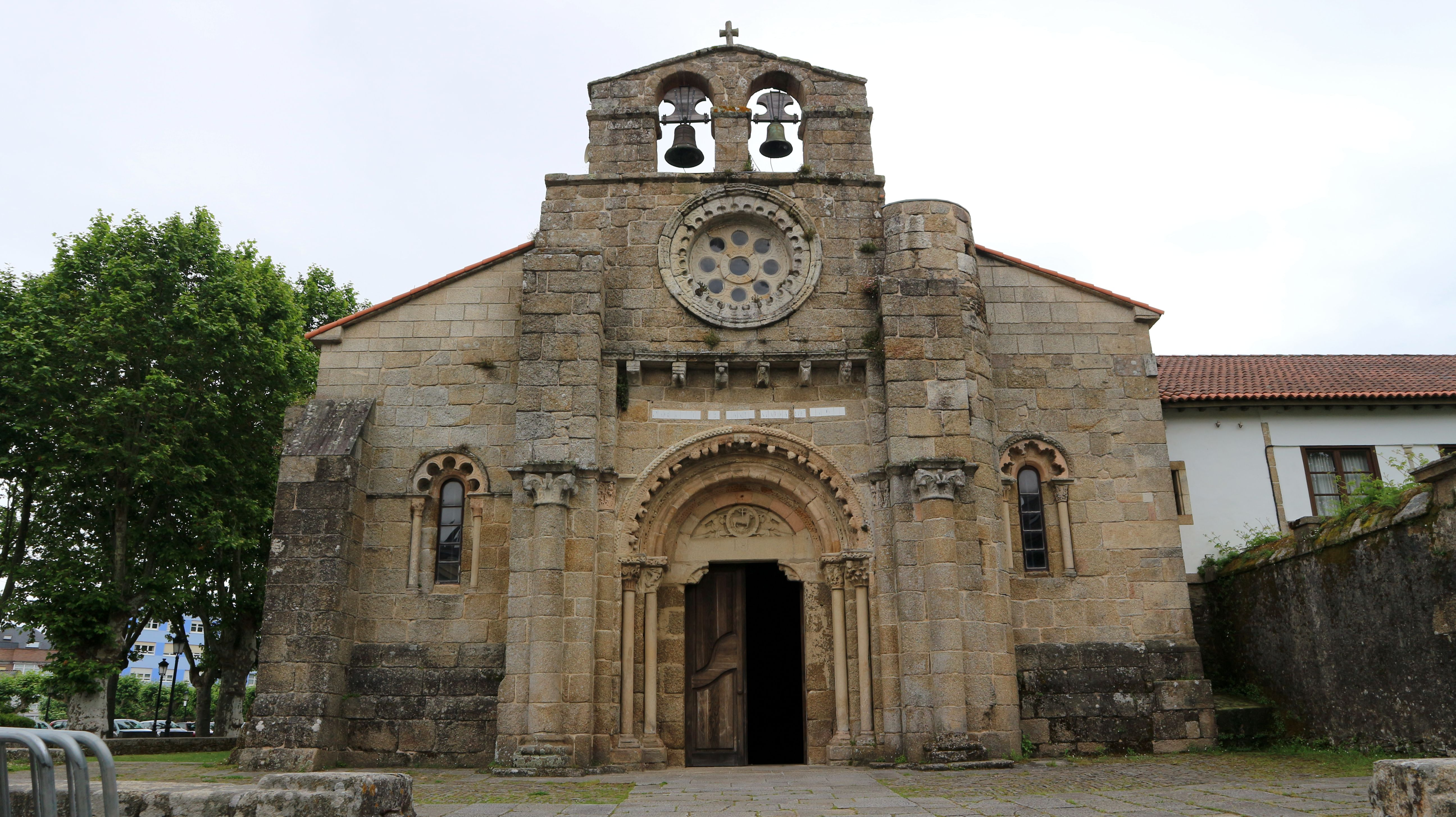 Igrexa de Santa María de Cambre, Cambre. Fachada.